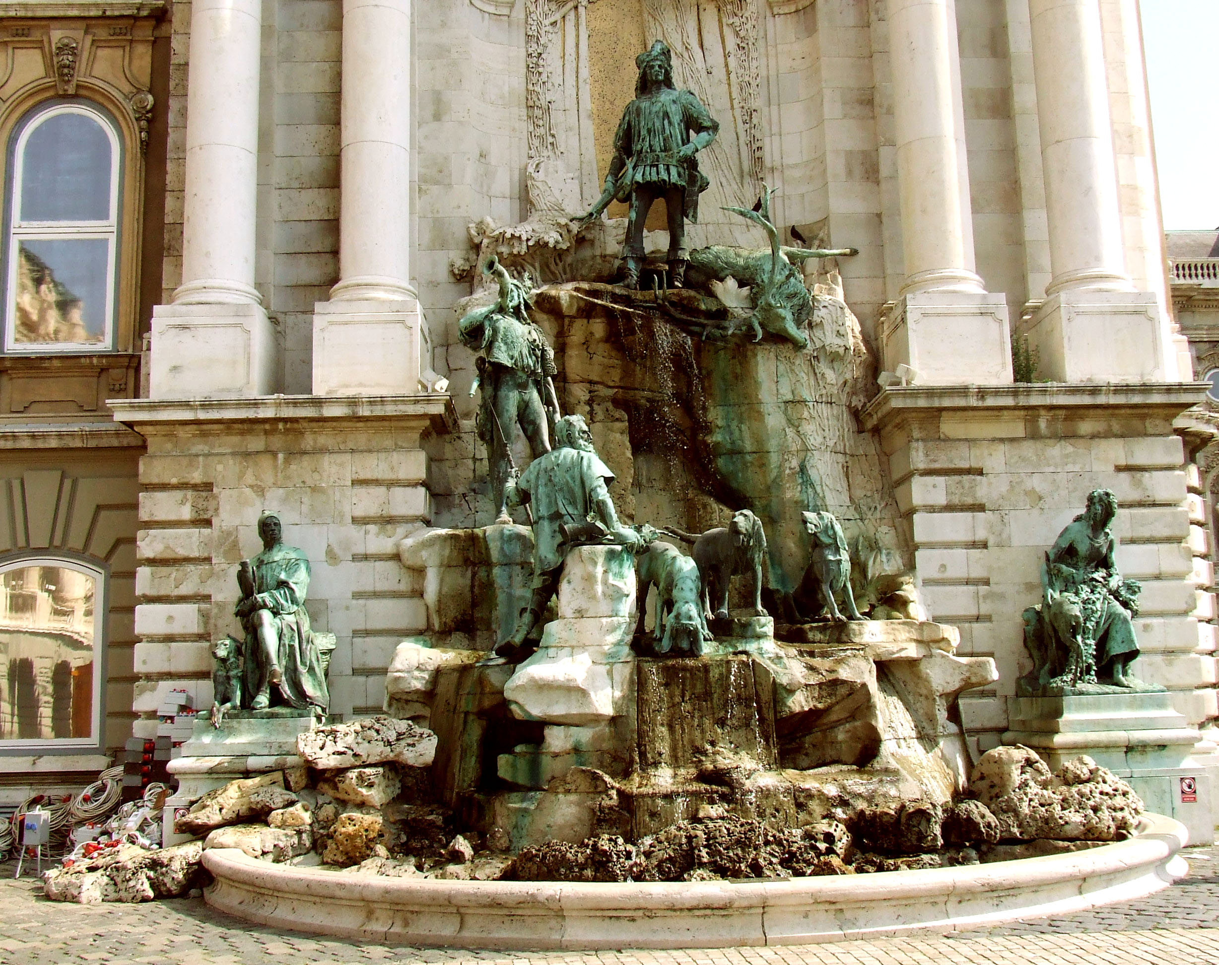 Lovski vodnjak na gradu v Budimpešti.